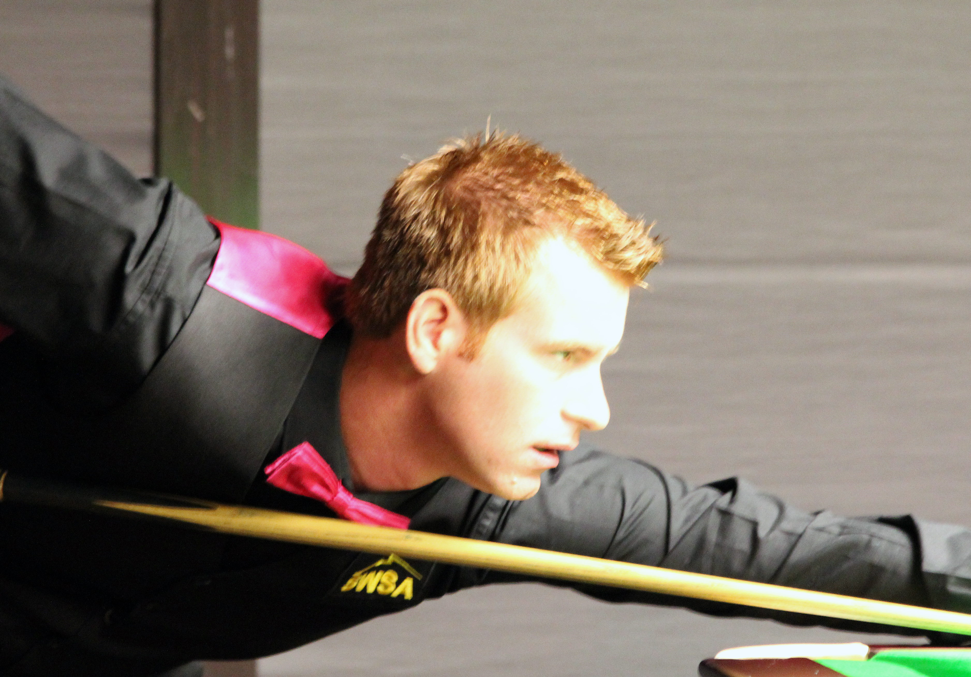 Andrew Norman beim Paul Hunter Classic 2012